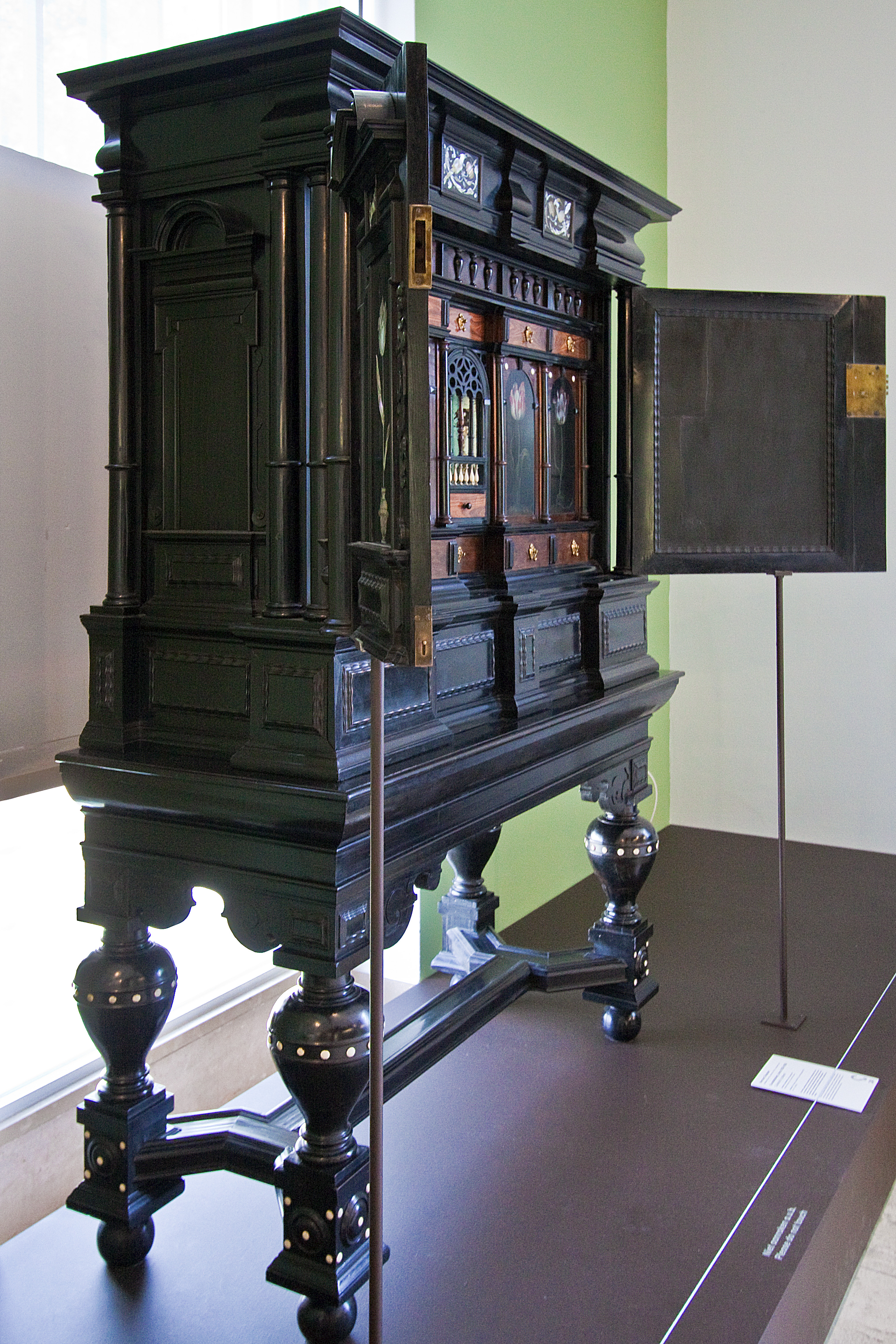 Kunst (tulpen)kabinet, Herman Doomer (Toegepaste kunst en Design, zaal 44) Country: Netherlands City: Rotterdam Location: Museum Boymans van Beuningen Artist: Herman Doomer Name: Kunst (tulpen) kabinet